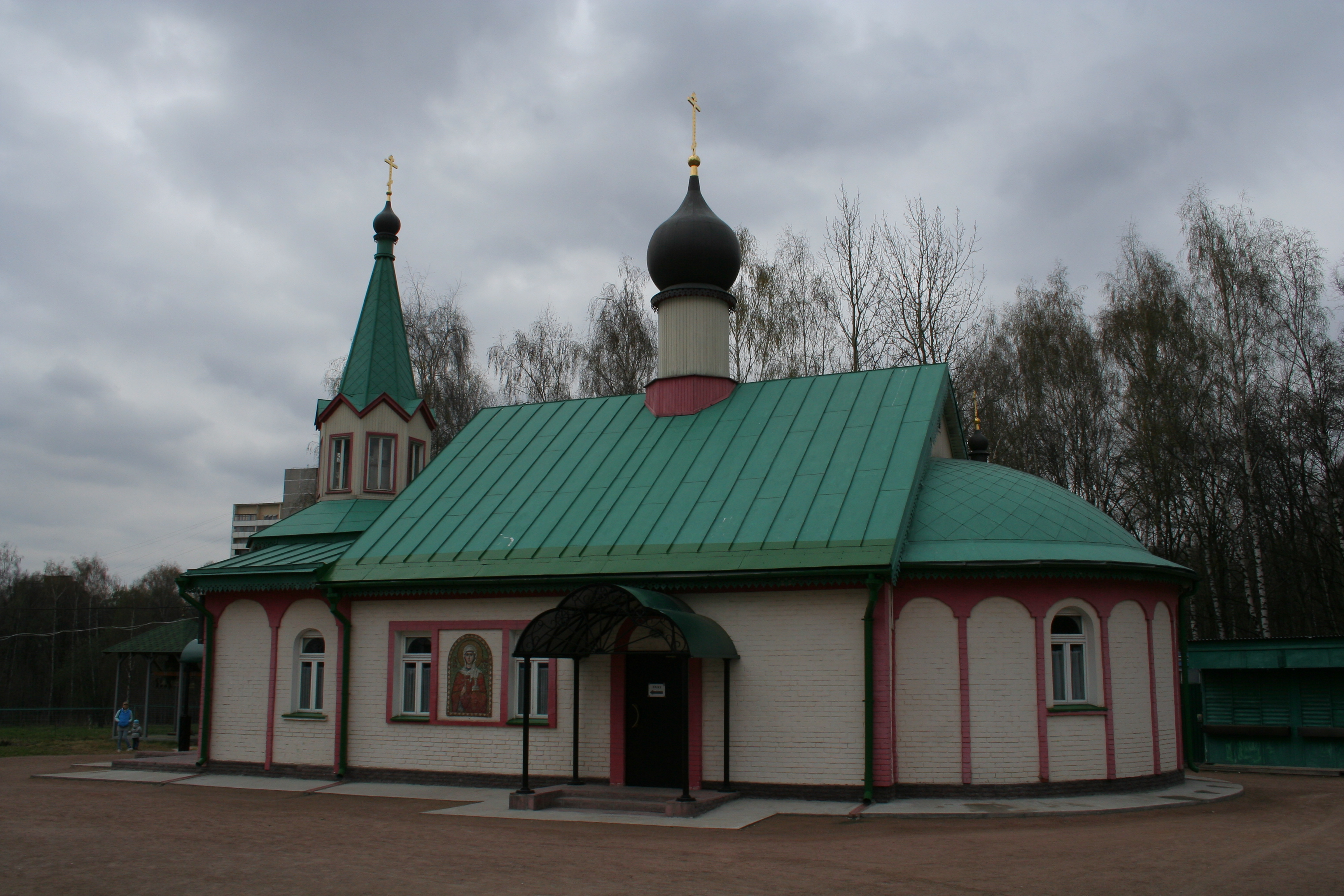 Kirche der Heiligen Anastasia von Sirmium zu Tjoply Stan in Moskau.